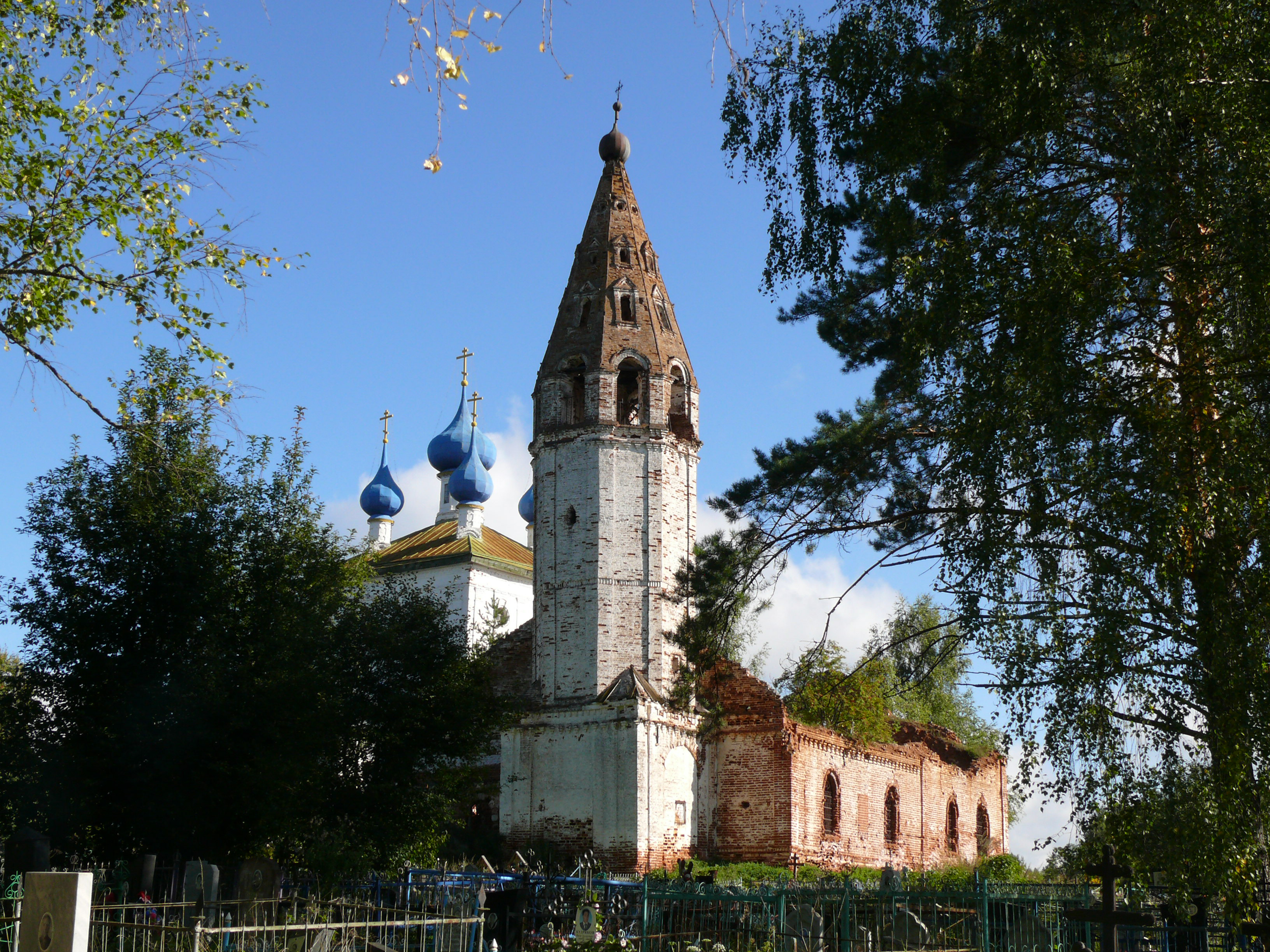 Храмовый комплекс: погост Старая Никола, Камешковский район, Владимирская область